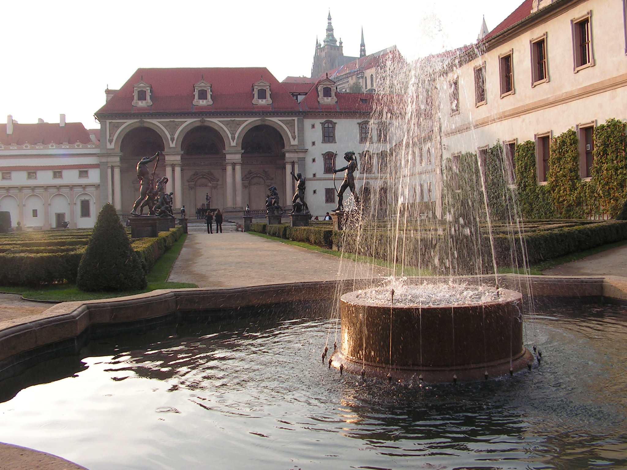 Waldsteinpalais / Valdstejnsky Palace / Wallenstein Palace